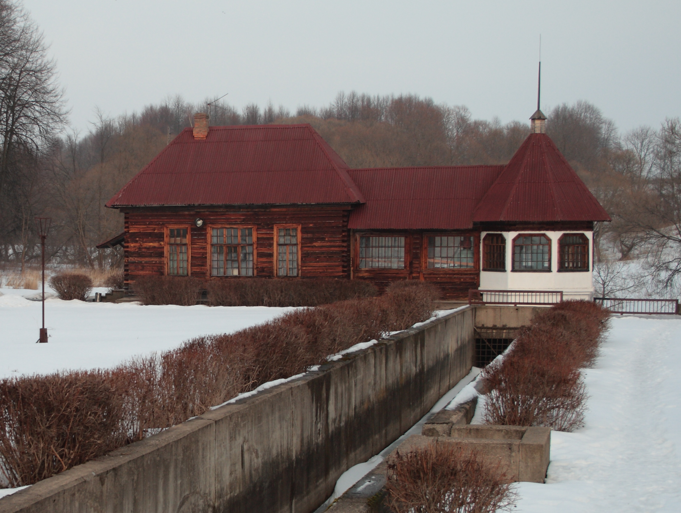 Здание электростанции ярополецкой ГЭС, построенной при содействии В. И. Ленина: Ярополец, Волоколамский район, Московская область